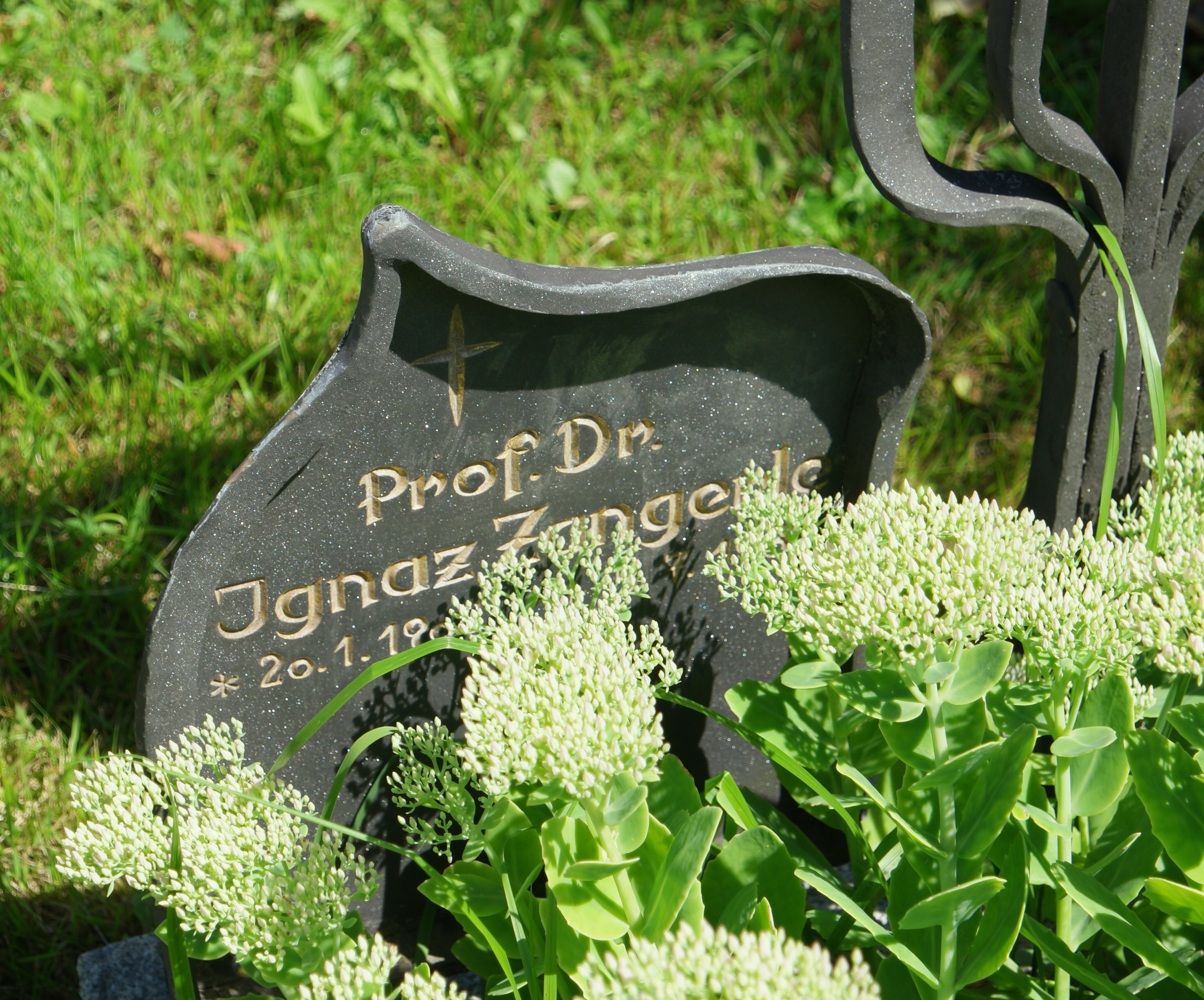 Grab des Erwachsenenbildners Ignaz Zangerle (1905-1987) auf dem Neuen Friedhof Mühlau, Innsbruck